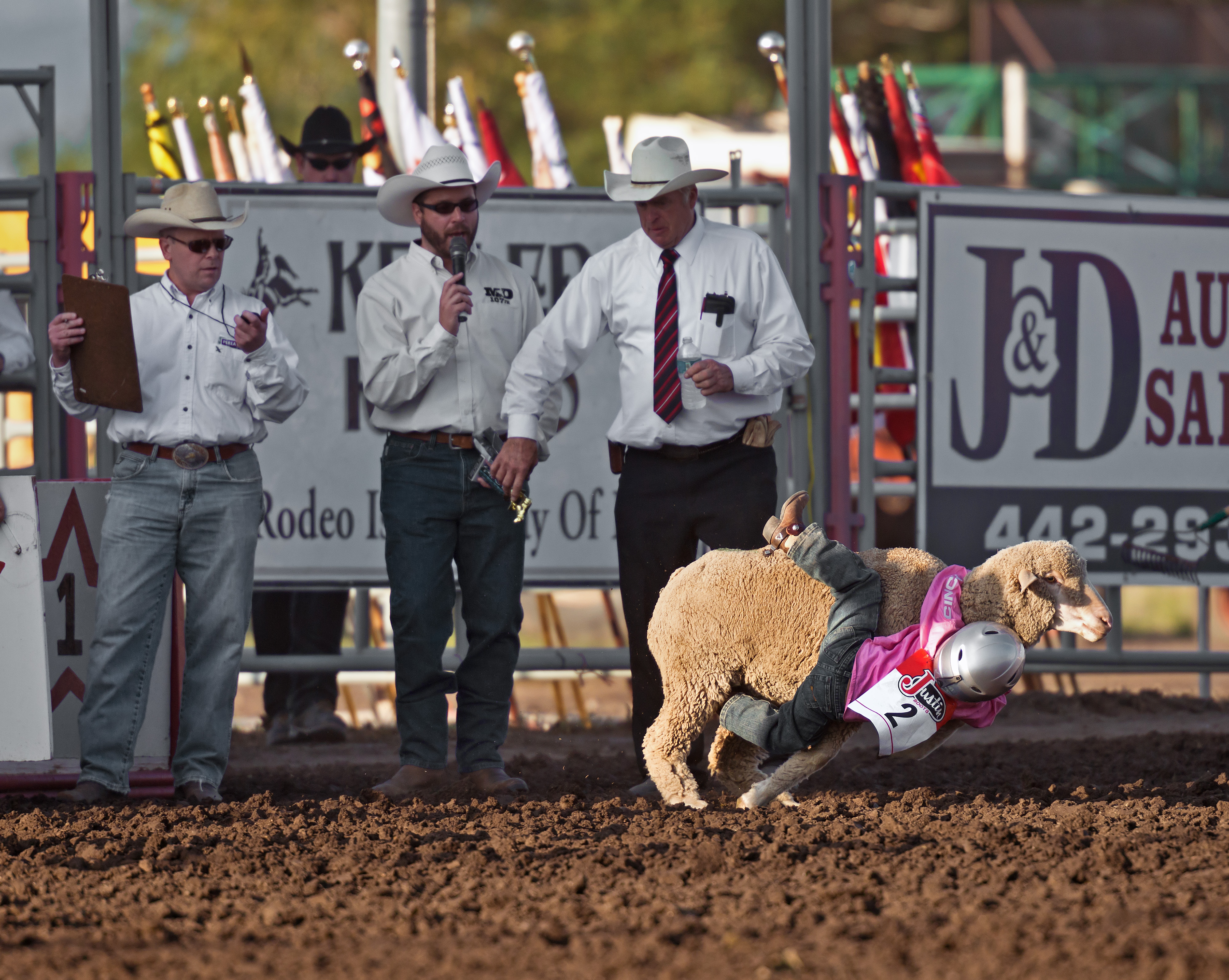 Mutton Bustin